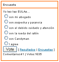 Encuesta típica. Captura de pantalla de